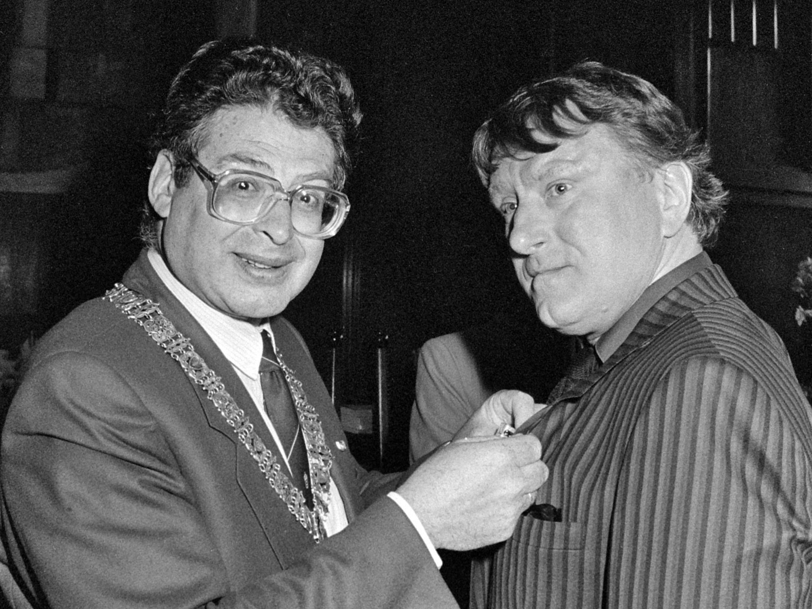 Lintjesregen; burgemeester Van Thijn geeft een onderscheiding aan Peter Oosthoek 27 april 1984